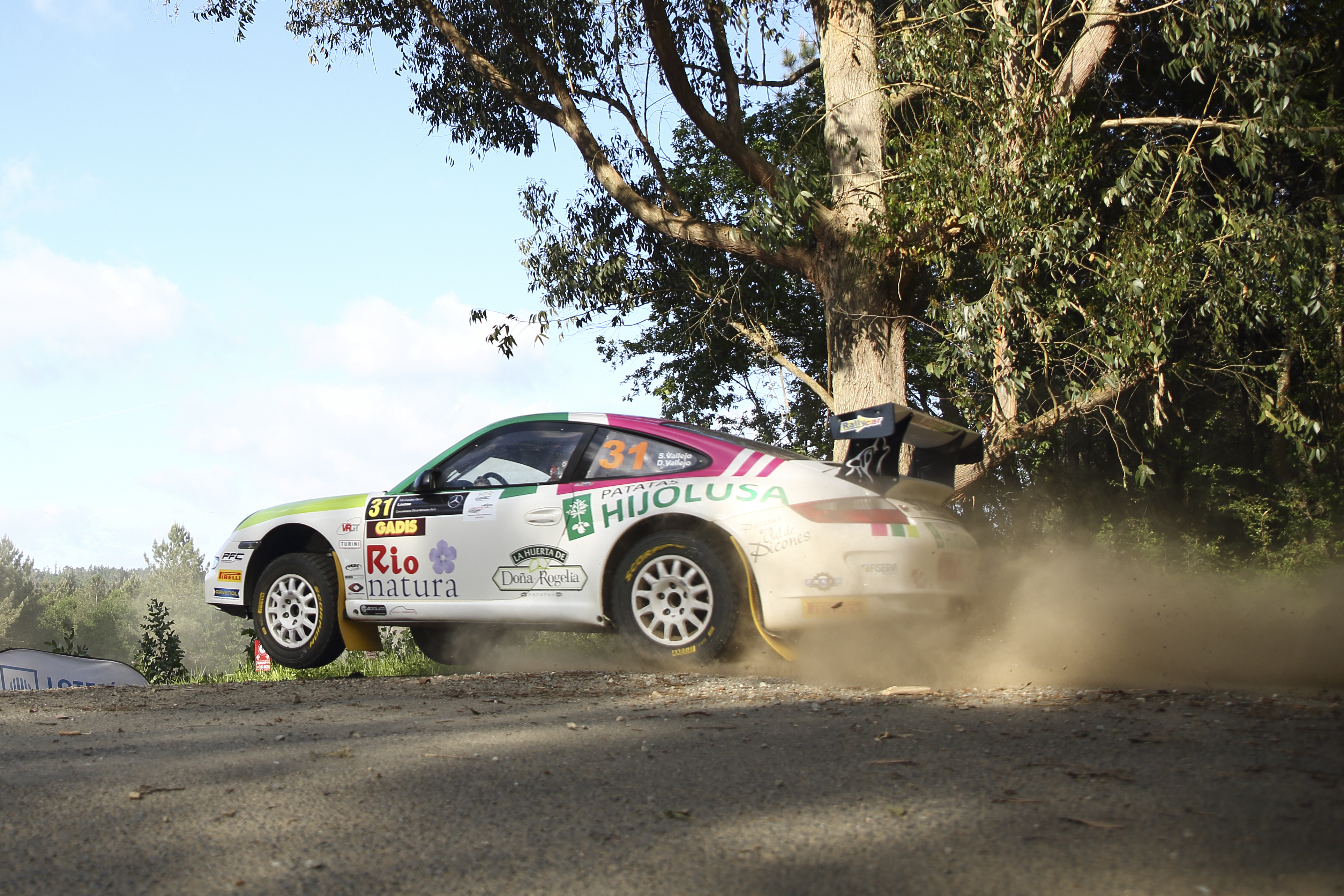 Rally Terra da Auga 2019, sería prueba puntuable para el SCER y CERT, donde Xevi Pons junto a Rodrigo Sanjuán con su Skoda Fabia R5, lograría la victoria que les permitiría volver a ser lideres del Supercampeonato.